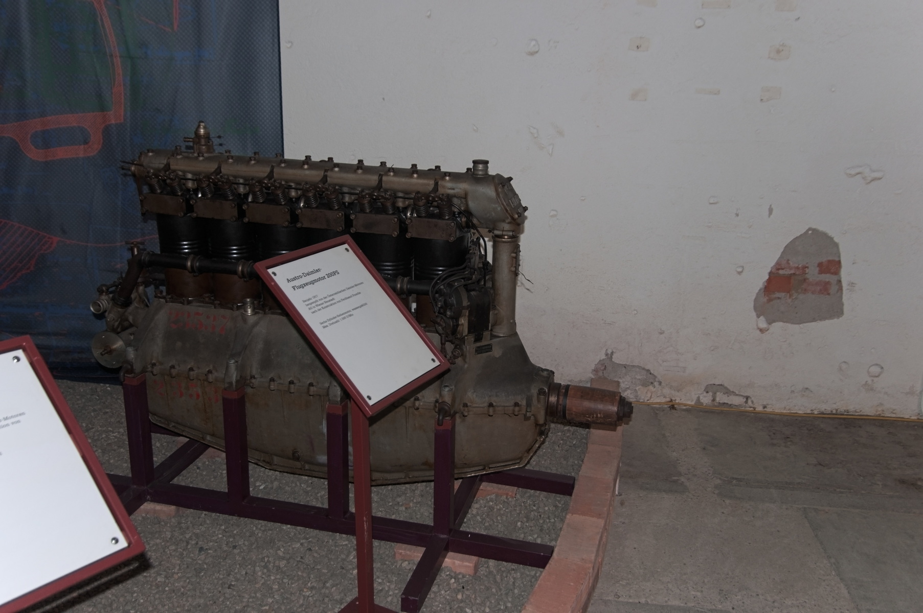 Austor Daimler 6 (200 PS) aircraft engine